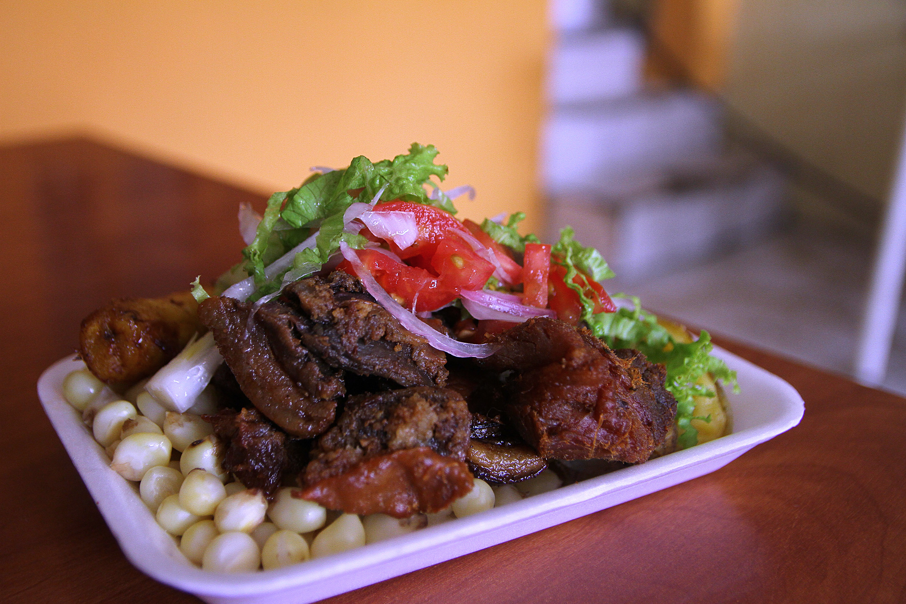 Cuenca, Azuay 31 may (Andes).- Cuenca, oficialmente Santa Ana de los Ríos de Cuenca, es una ciudad del centro sur de la República del Ecuador y es la capital de la provincia del Azuay, la ciudad es apetecida por el turismo internacional y como ciudad favorita para el retiro. Fotografías: Carlos Rodríguez/Andes.